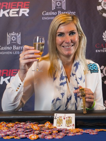 Jackie Glazier nach ihrem Sieg beim Ladies Event der World Series of Poker Europe 2013